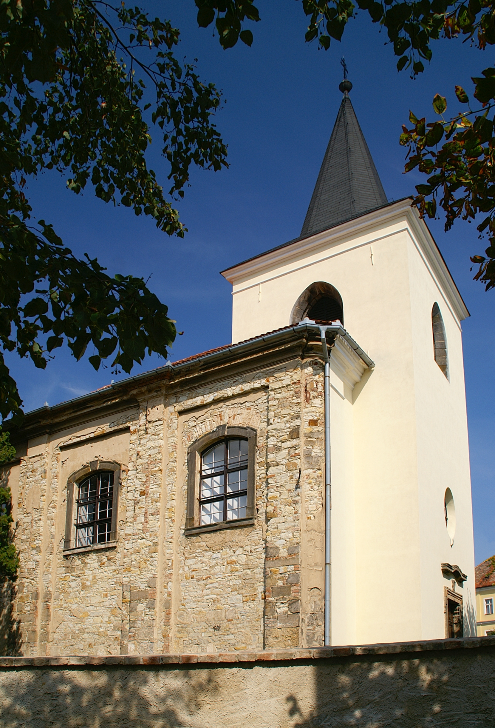 Kostel Nanebevzetí Panny Marie stojící na návsi.